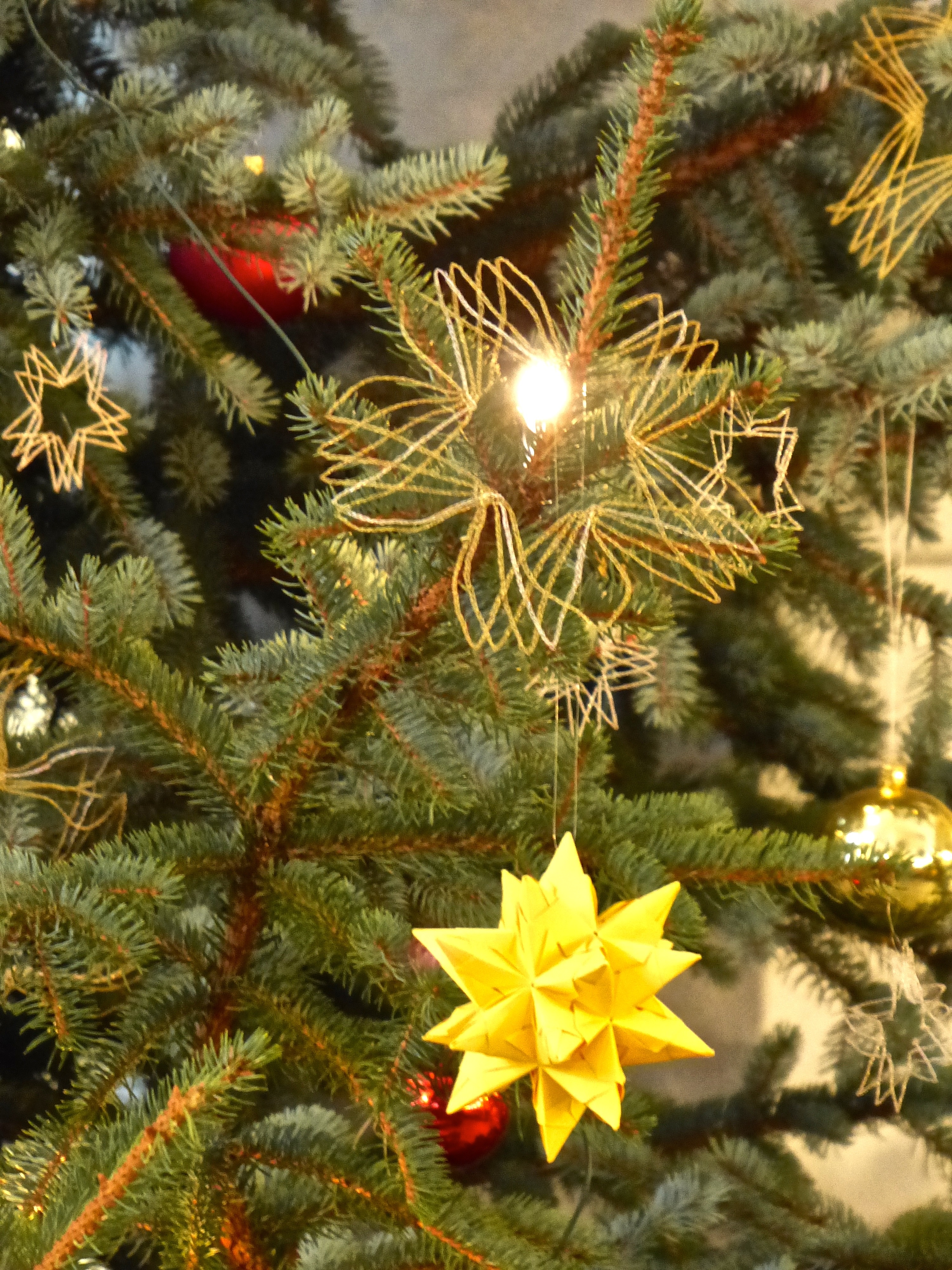 Weihnachtsbaum mit Fröbelstern und Drahtsternen